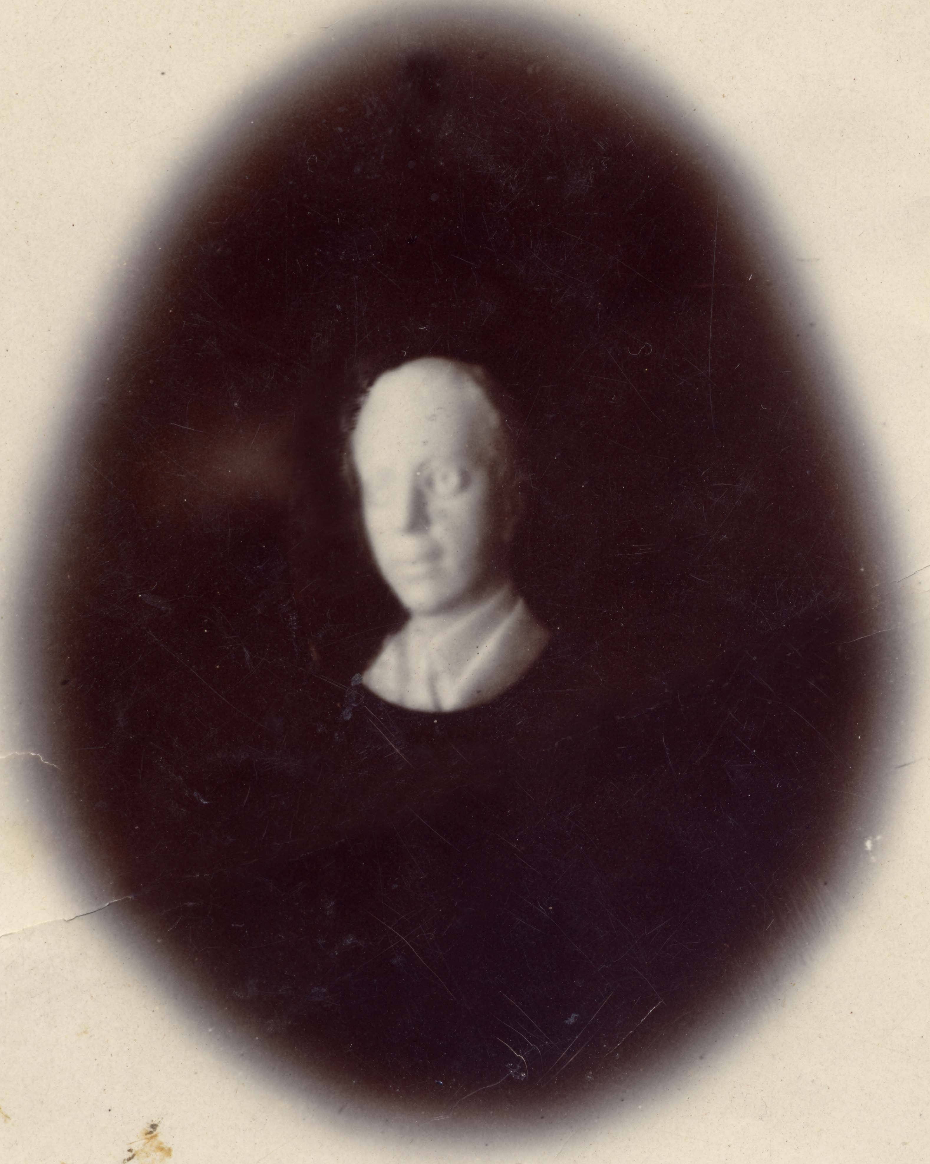 foto di un'opera realizzata da Giovanni Noto nel 1927 ( ritratto di Enrico De Nicola)